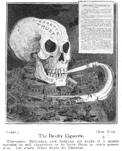 Anti-smoking ad